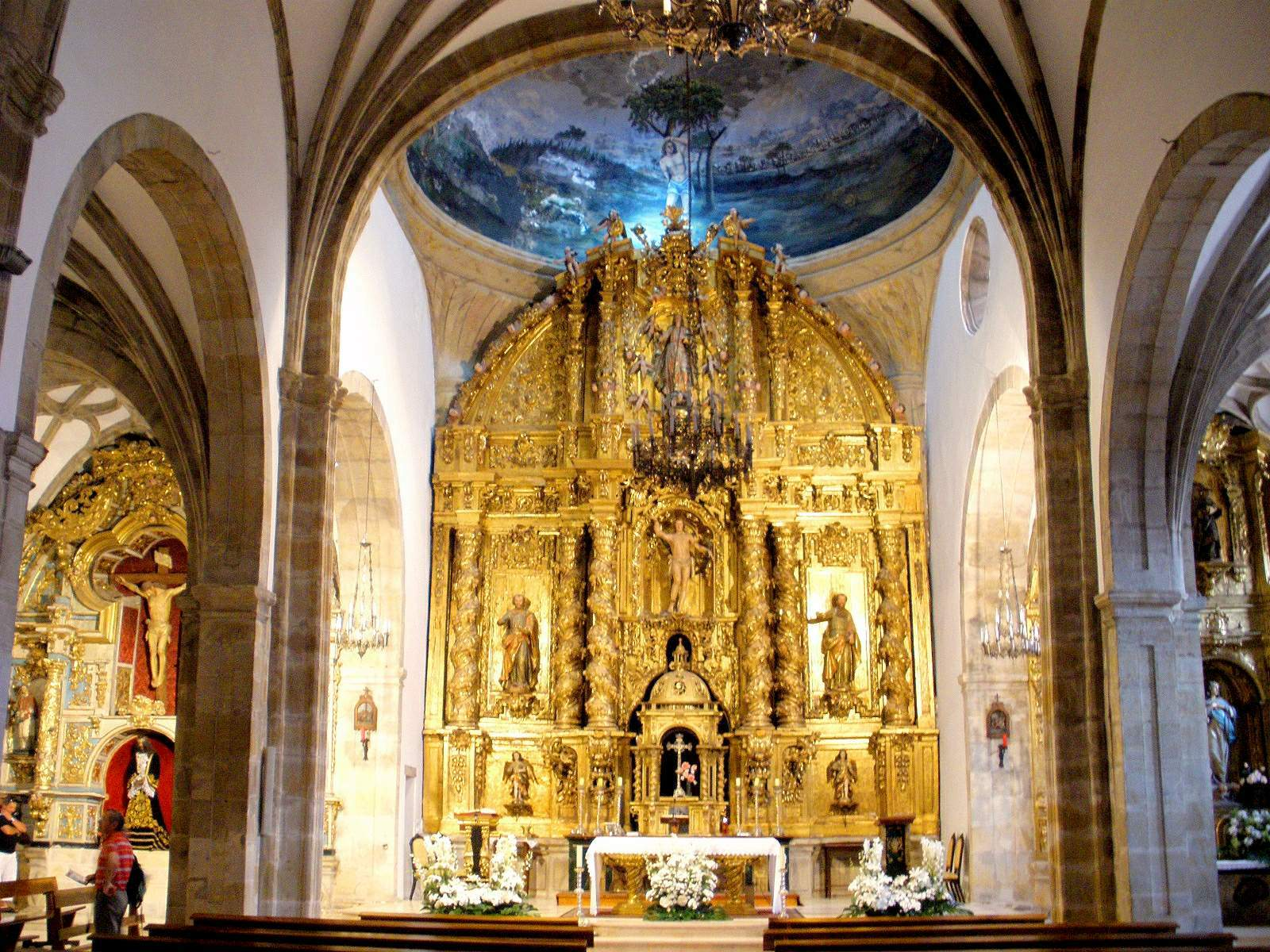 Iglesia de San Sebastián, Reinosa (Cantabria)